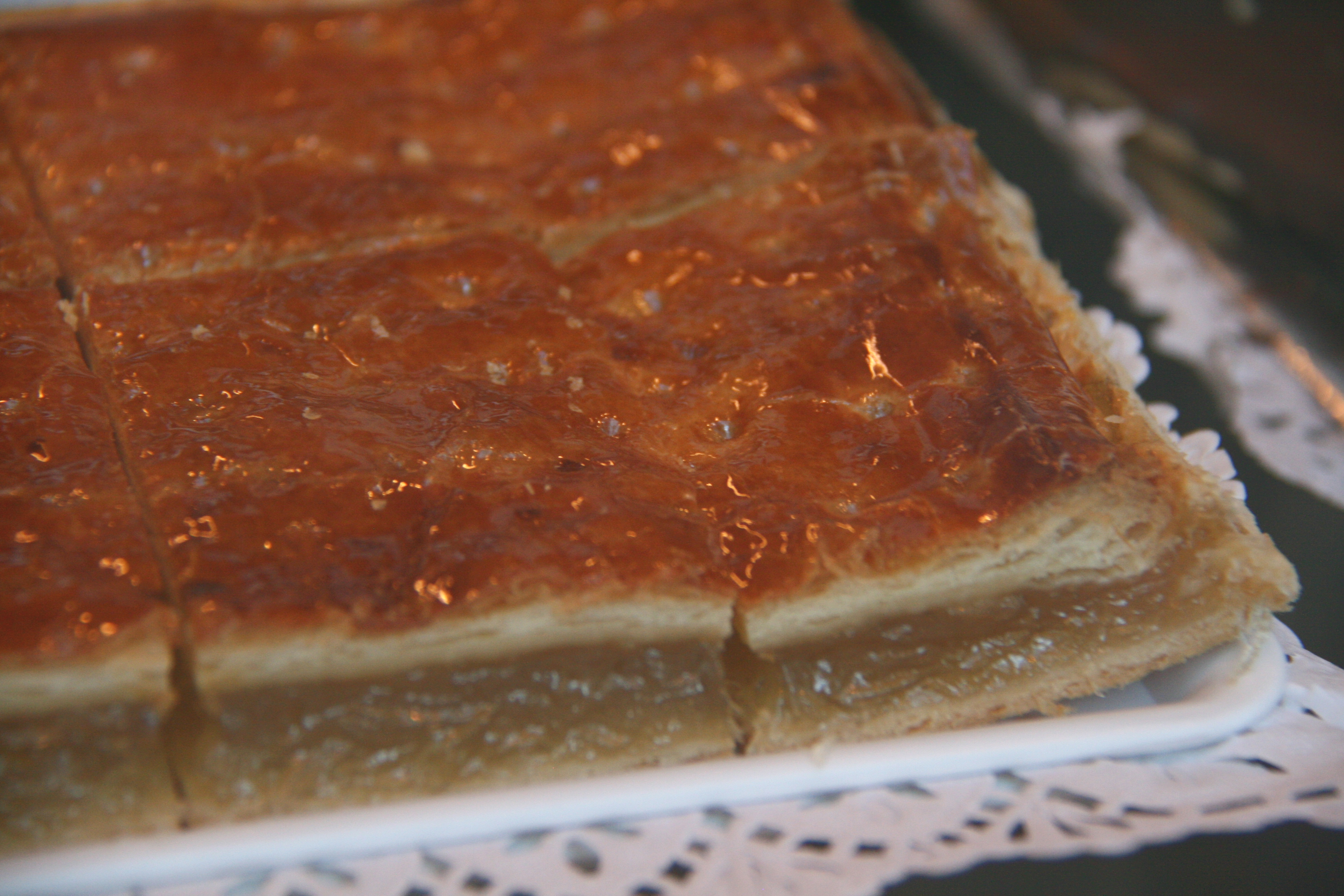 Bayonesa - Pastelería de Madrid